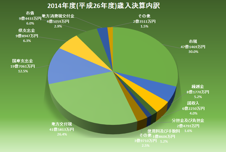 見附市の2014年度(平成26年度)歳入決算の内訳です。